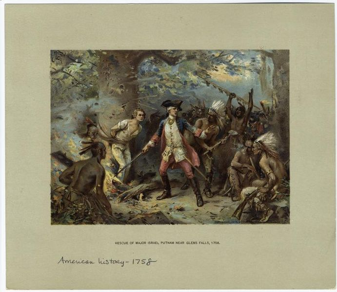 Sauvetage de Putnam durant la guerre de sept ans en 1758.